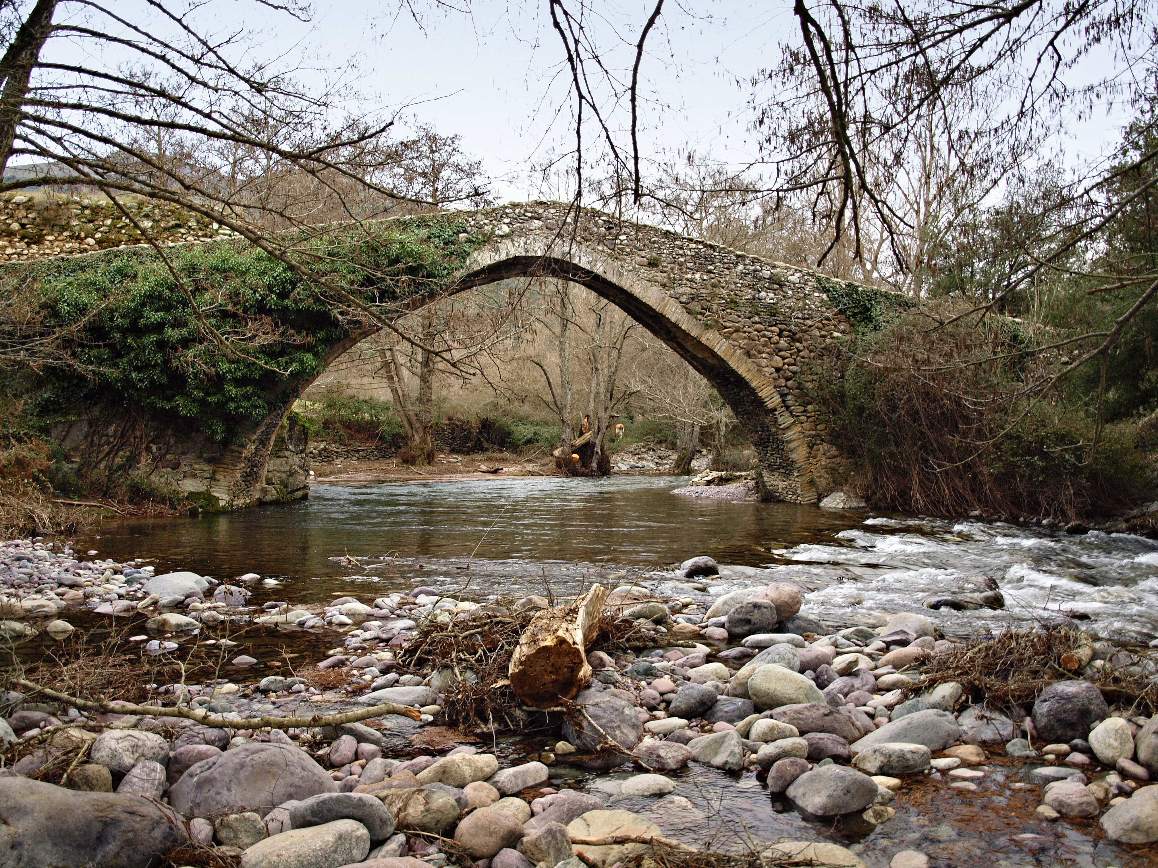 Castifao (Corsica) - Pont génois de Piana sur la Tartagine